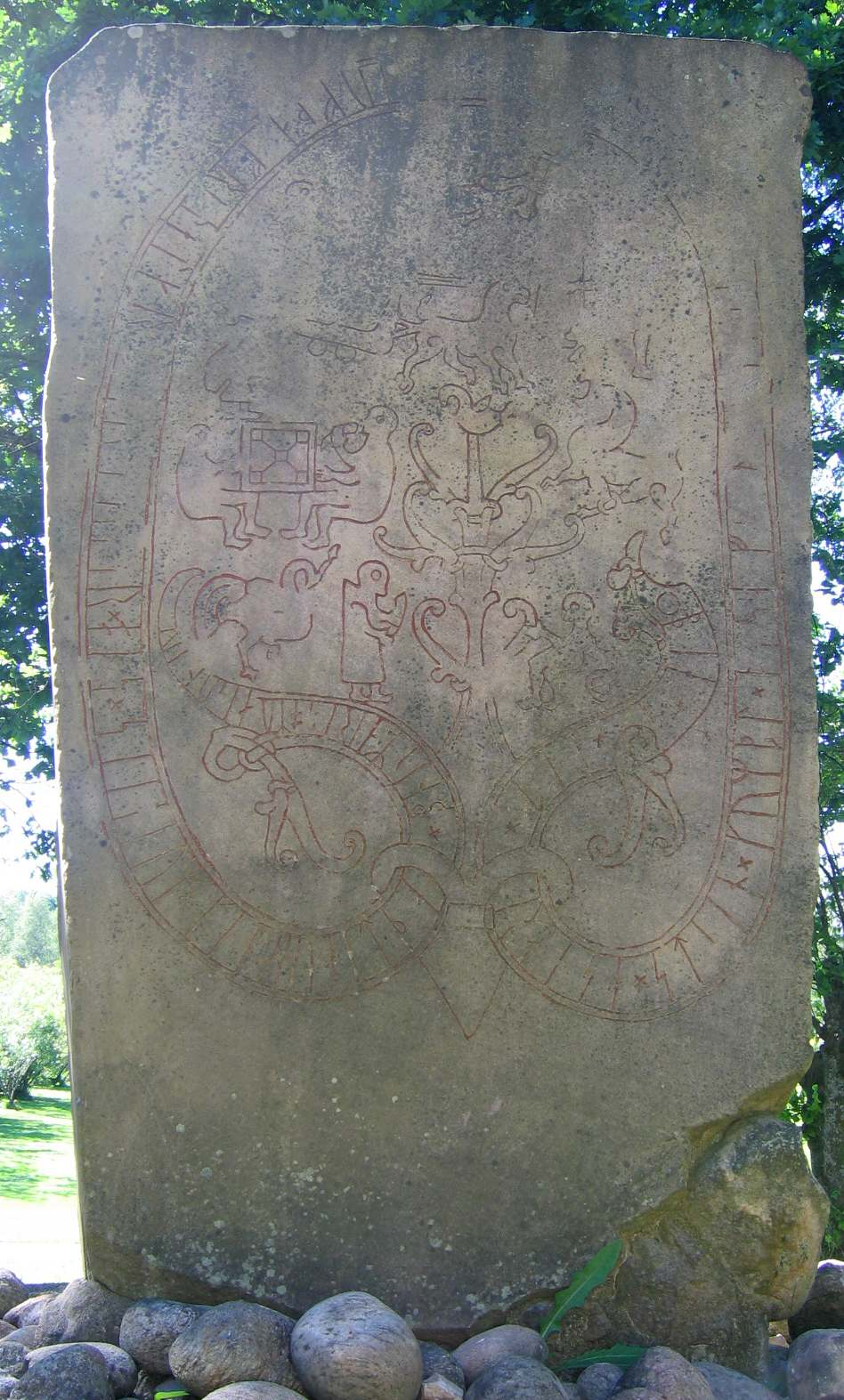 Kopia av den förstörda runstenen Gs 19 vid Ockelbo kyrka. Detalj.